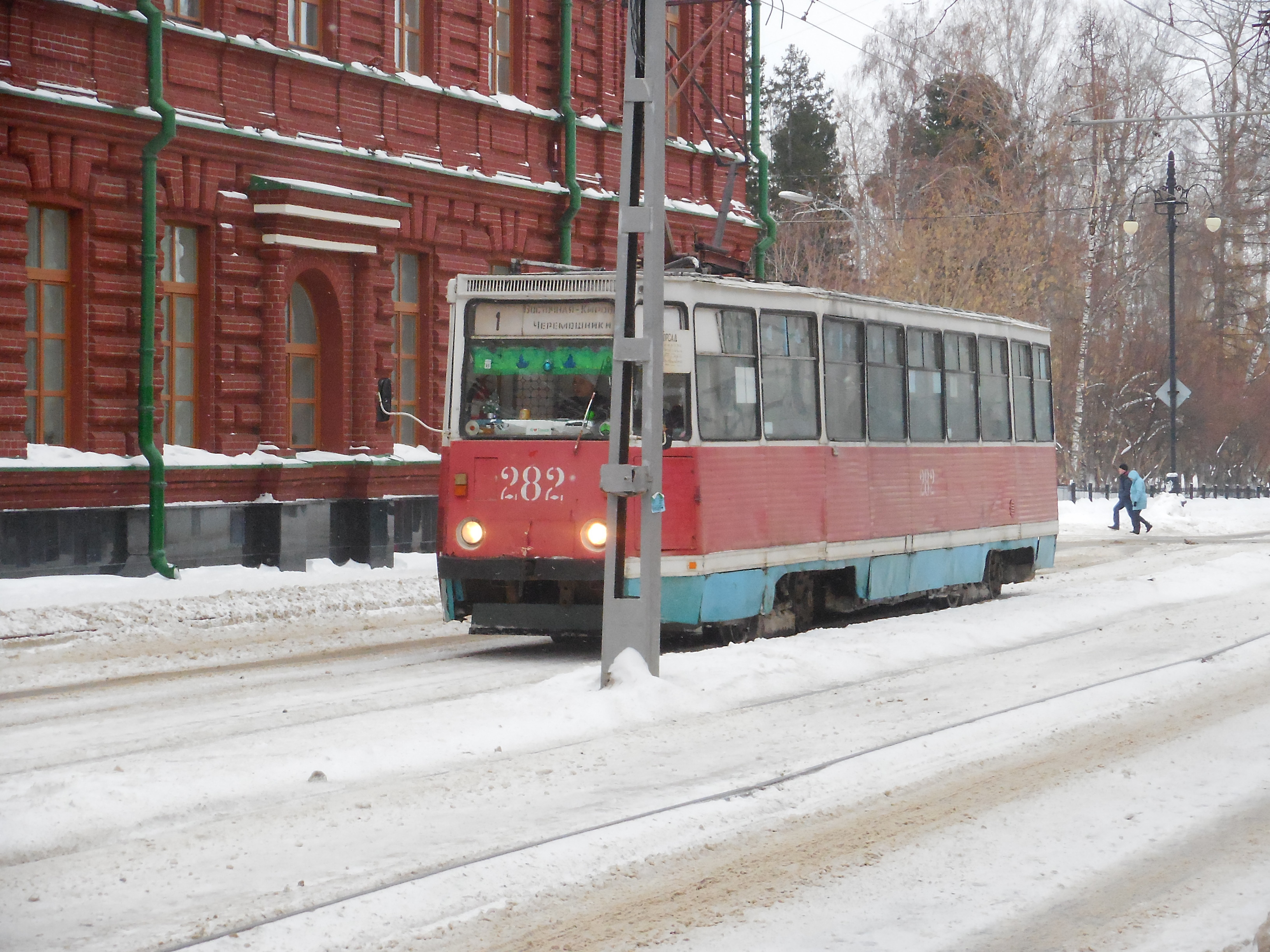 Трамвай 71-605 в Томске (ул. Советская)